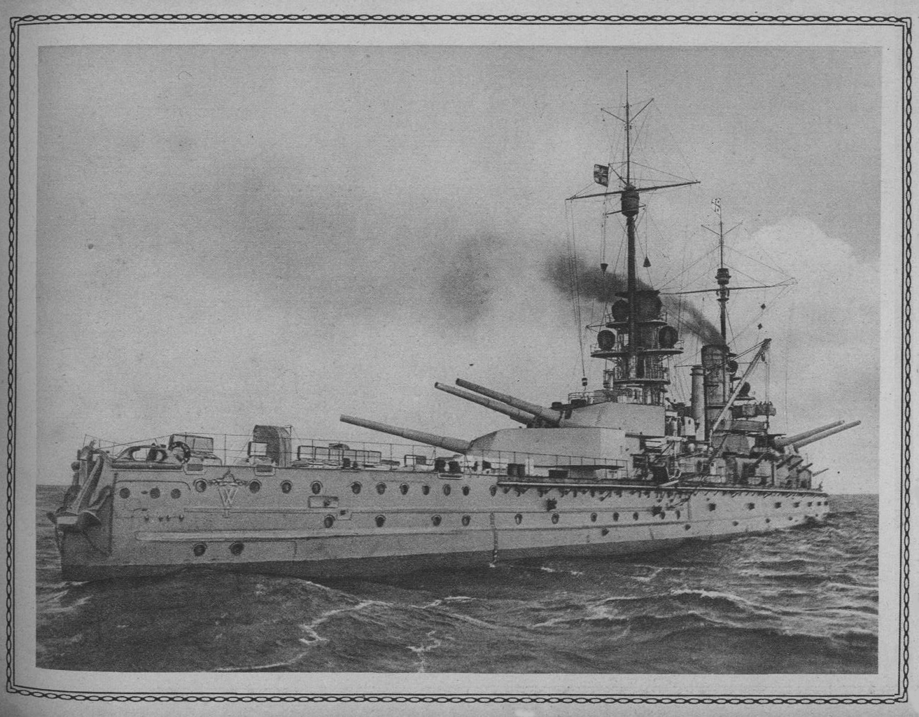 Une vue du cuirassé SMS Kaiser, classe Kaiser pendant la Première guerre mondiale. Vue de la poupe et de l'ancre.